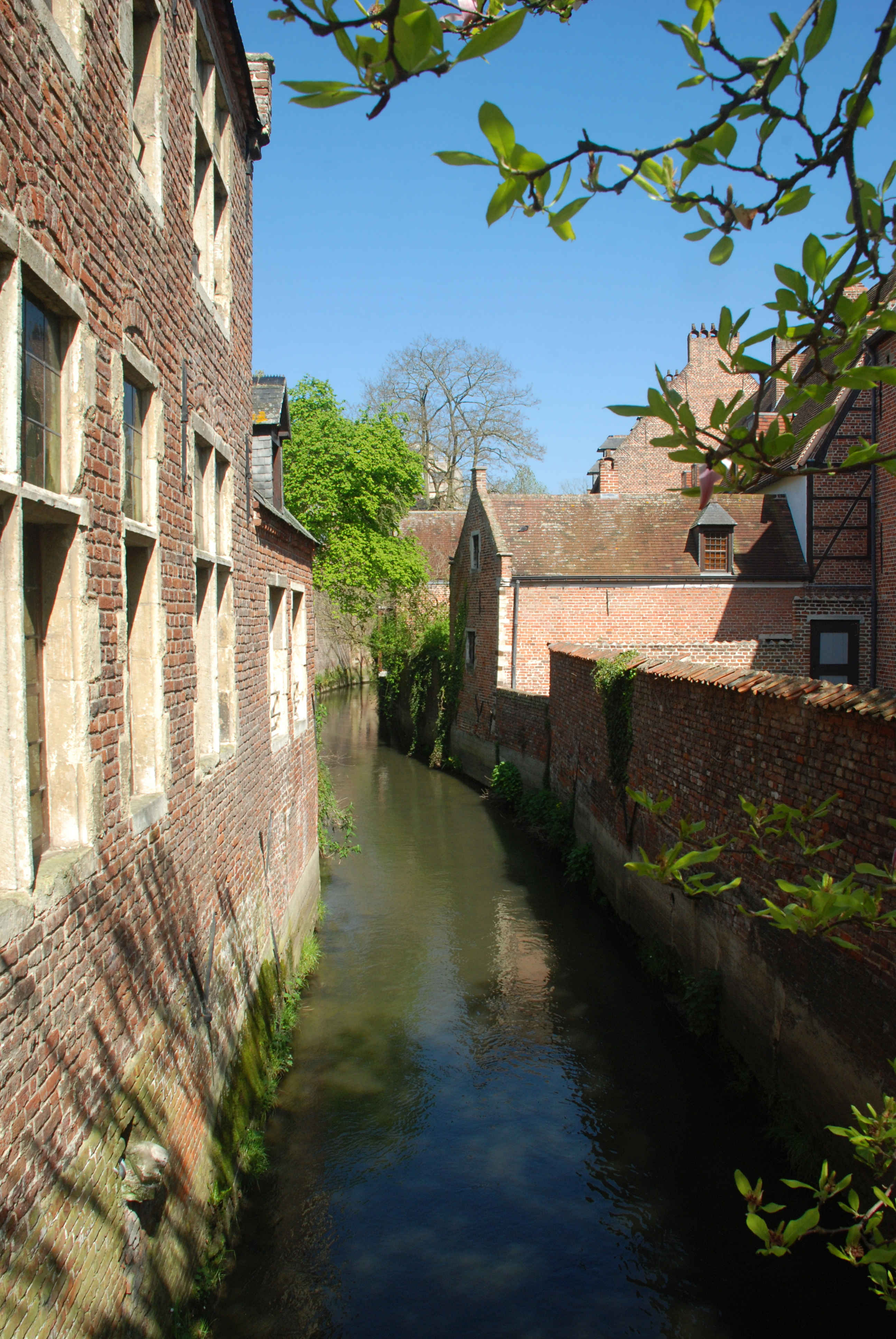 Belgium - Leuven - Groot Begijnhof - vue sur la Dyle depuis la Rechtestraat